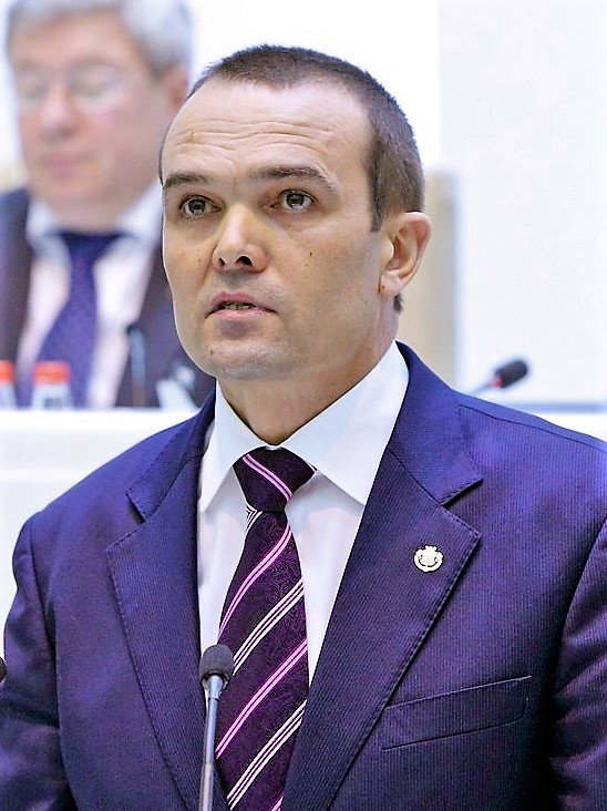 Михаил Васильевич Игнатьев